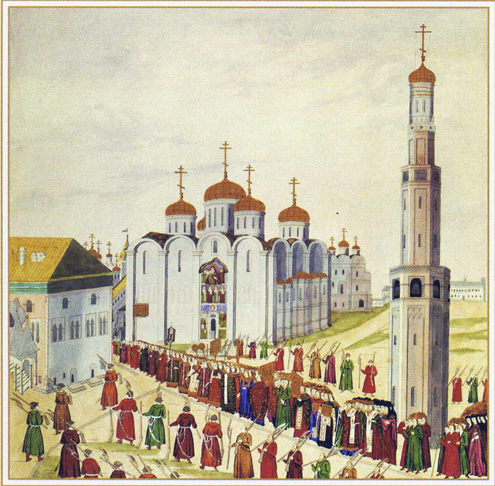 3 мая 1613 года. Шествие высшего духовенства, царя Михаила Федоровича, бояр, дворян и горожан по территории Московского Кремля в Успенский собор для совершения в нем торжественного молебна